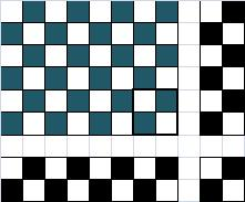 Labase kanga rakendus